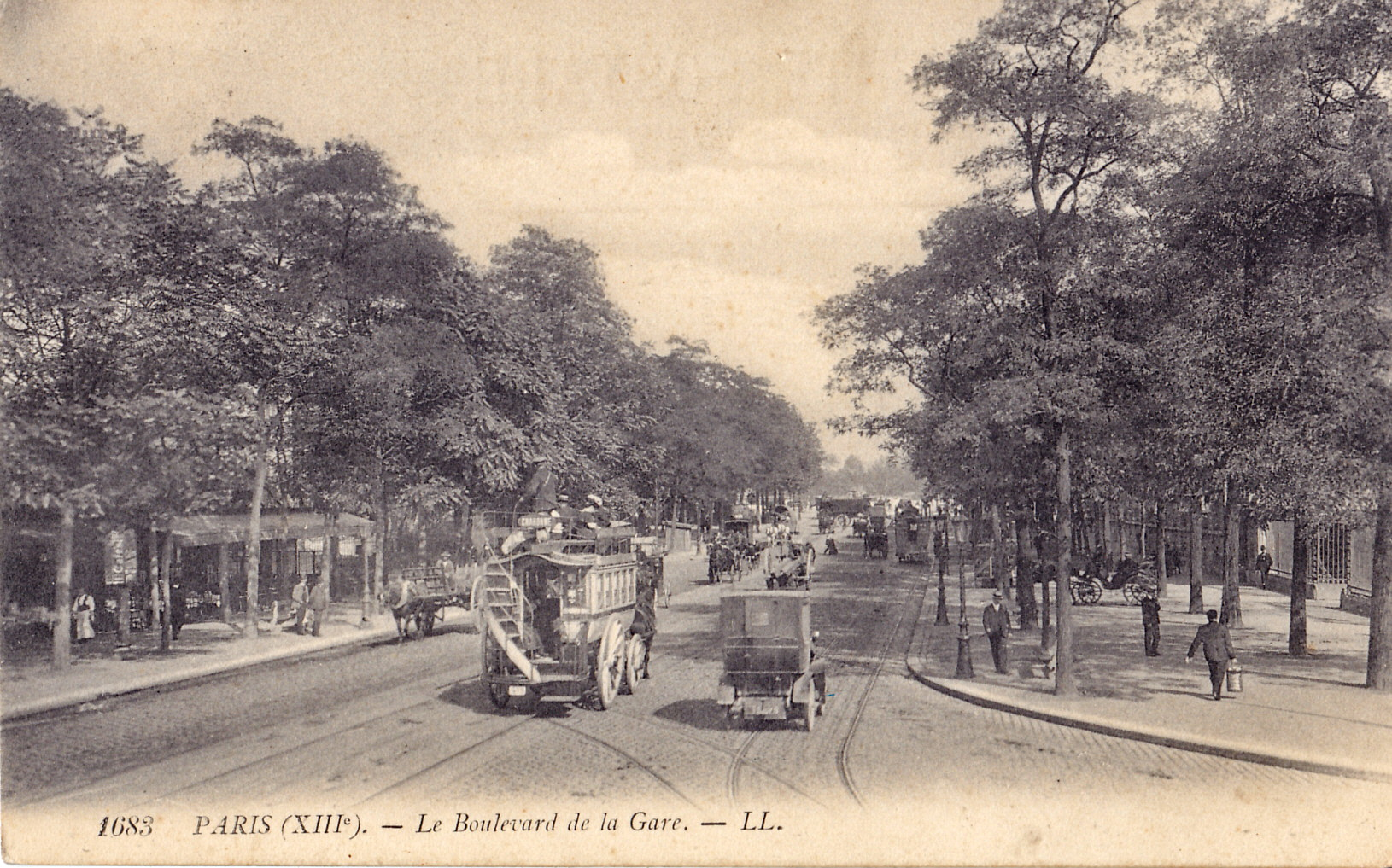 Carte postale ancienne éditée par LL, n°1683 : PARIS - Le Boulevard de la Gare